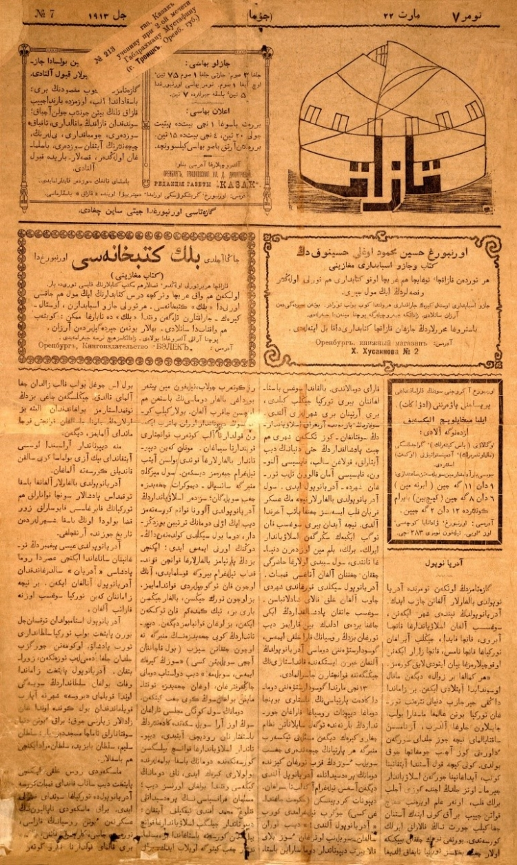 7-й номер газеты «Казах» от 22 марта 1913 года